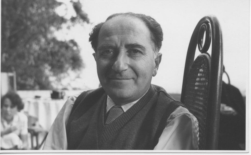 Cronologia: 1950 - 1960 Autore: Anonimo (fotografo principale) Bibliografia: Un coraggio silenzioso : Leonardo De Benedetti, medico, sopravvissuto ad Auschwitz / Anna Segre. - Torino : Zamorani, c2008.